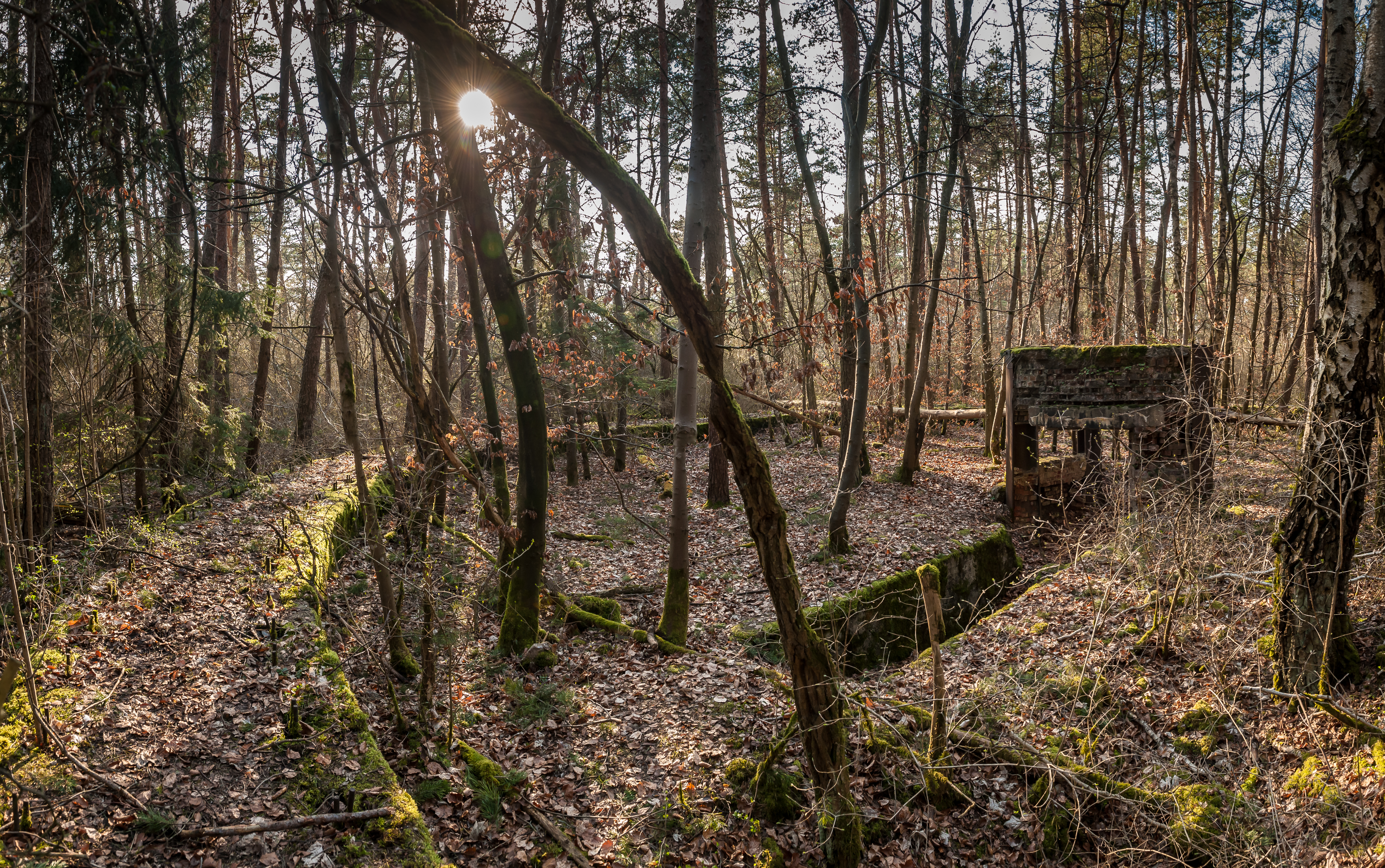 Reste der UKW-Drehfunkfeueranlage FuSAn 724/725, Deckname „Bernhard“, im NSG Venusberg bei Aidlingen, Baden-Württemberg